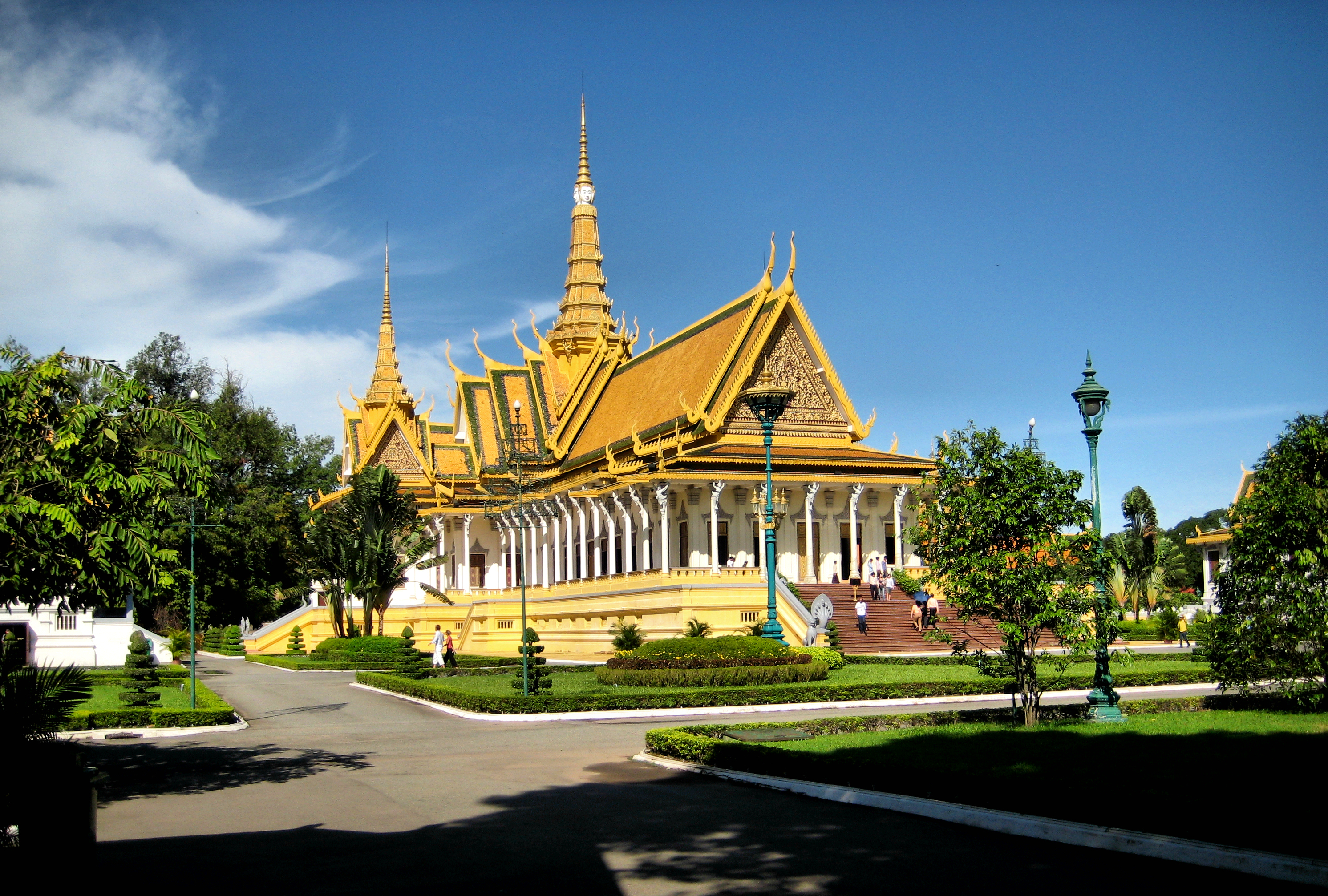 Royal Palace